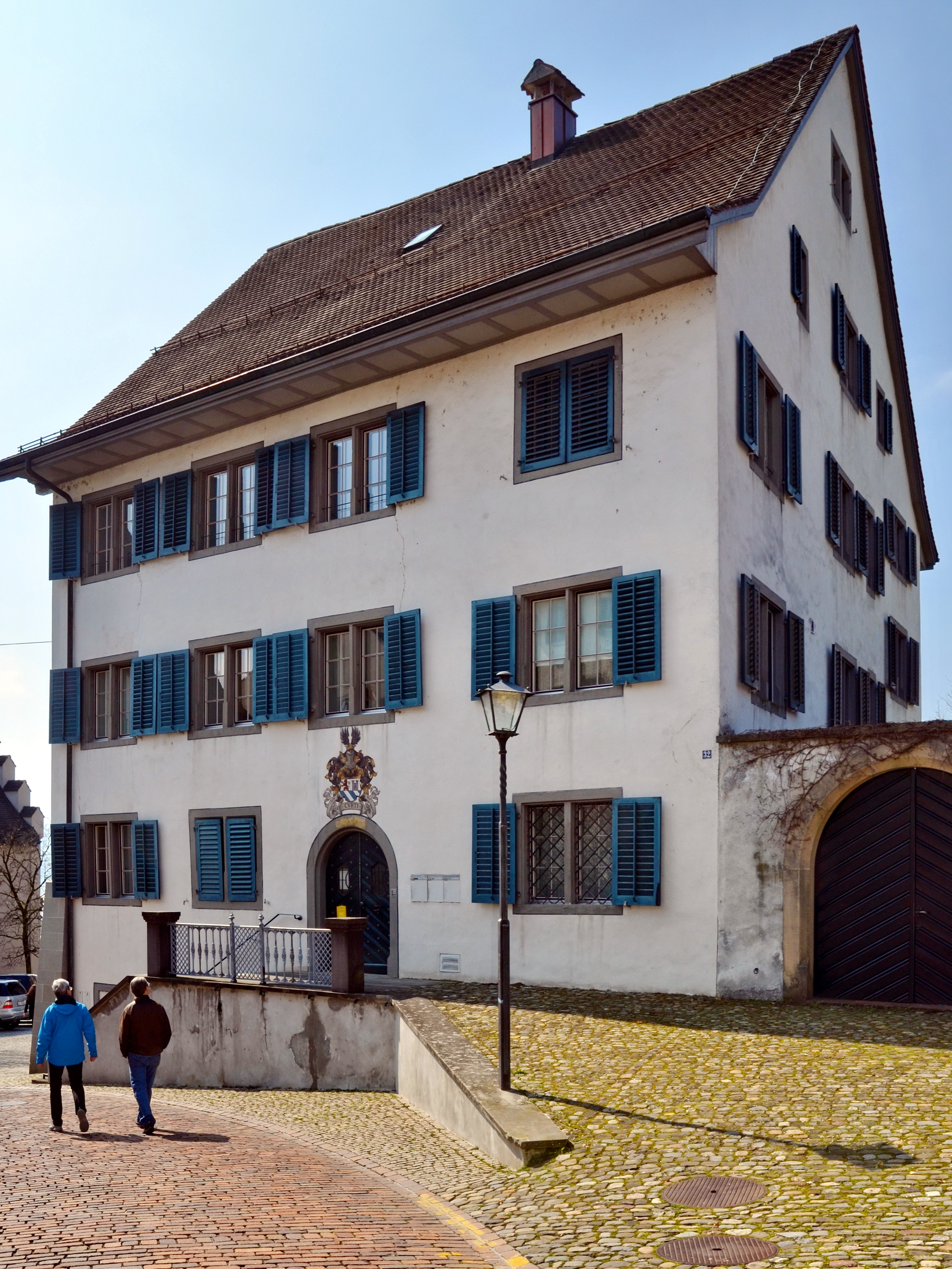 Haus Schlossberg in Rapperswil (Switzerland)